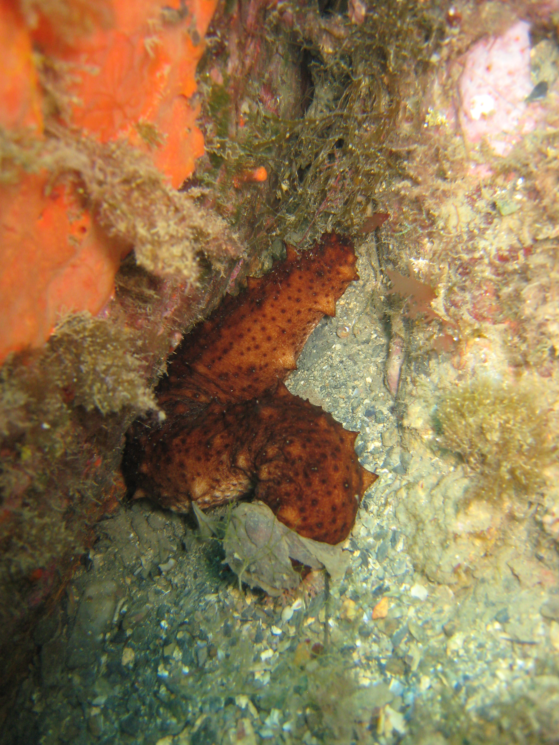 Holothurie brune (Holothuria stellati) en Méditerranée près de Banyuls [NB : identification très douteuse, probablement plutôt H. tubulosa]